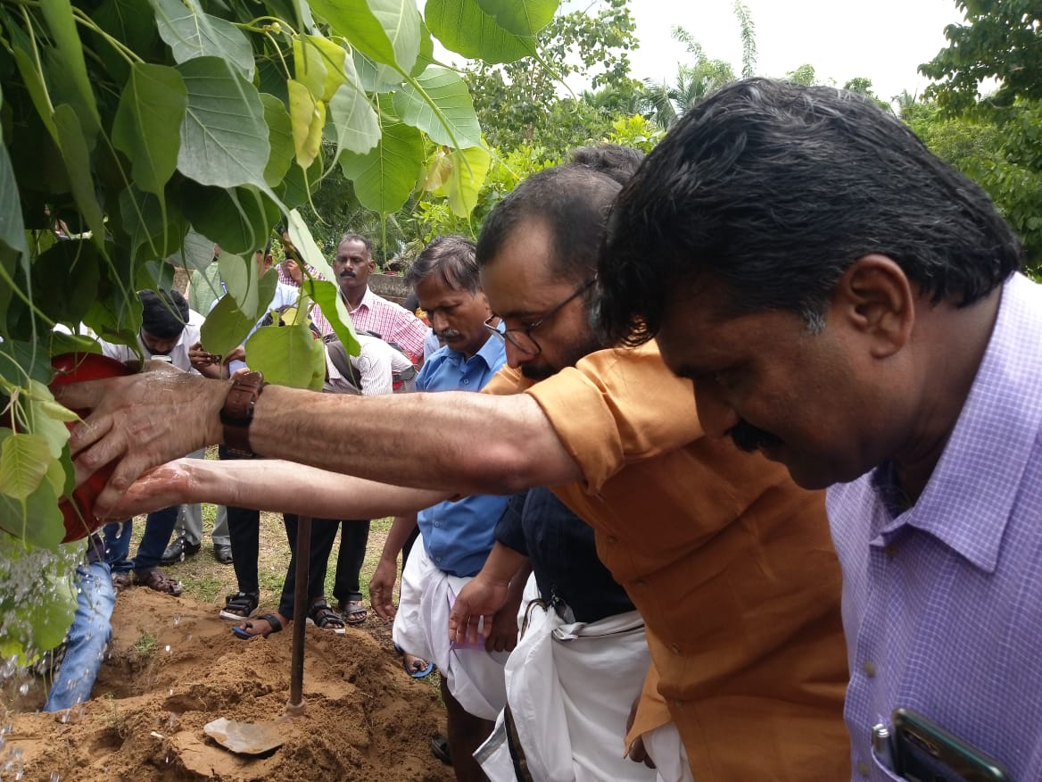 ഉറൂബ് നഗറിലെ ശക്ത്തമായ കാറ്റിലും മഴയിലും കടപറഞ്ഞു വീണ പേരാല്‍ മരത്തെ മരം മാറ്റിനടല്‍ പ്രക്രിയയിലൂടെ പൊന്നാനിയില്‍ തന്നെയുള്ള മാതൃ - ശിശു ആശുപത്രിയില്‍ മാറ്റി വെച്ച് സംരക്ഷിച്ച, പൊന്നാനിക്ക്‌ പ്രിയങ്കരരും ആദരണിയരുമായ നഗരപിതാവ് ശ്രീ സീ.പി മുഹമ്മദ്‌ കുഞ്ഞി അവര്‍കളും കേരള നിയമസഭാ സ്പീക്കറും സ്ഥലം എം .എല്‍.എ യുമായ ശ്രീ ശ്രീരാമകൃഷ്ണന്‍ അവര്‍കളും ഉദ്ഘാടന കര്‍മ്മത്തിന് ശേഷം അരയാല്‍ വൃക്ഷത്തെ പരിചരിക്കുന്നു. Peepal tree (sacred fig) ശാസ്ത്രീയ നാമം Ficus religiosa ഫാമിലി Moraceae.